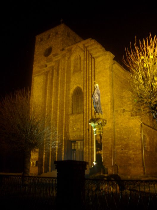 Kościół w Ożarowie nocą